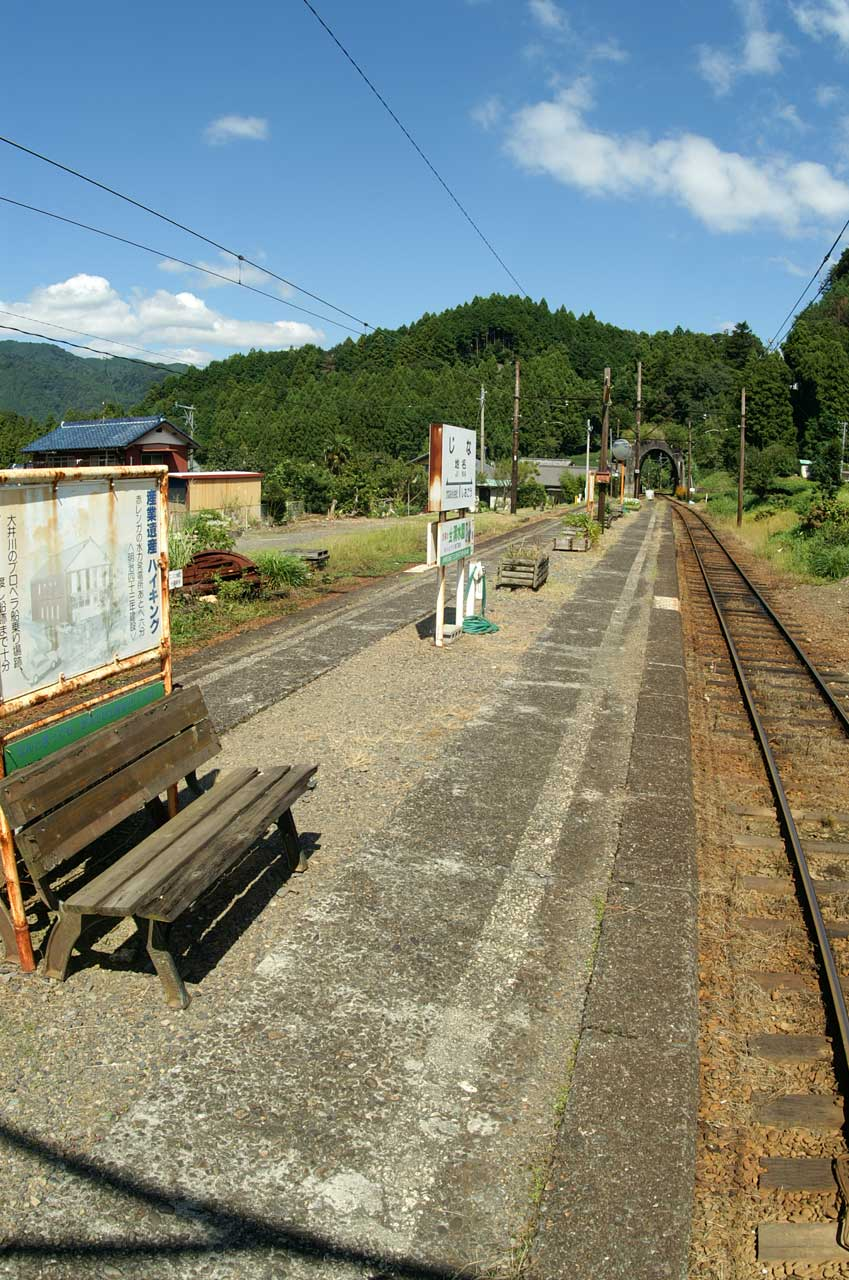 地名駅